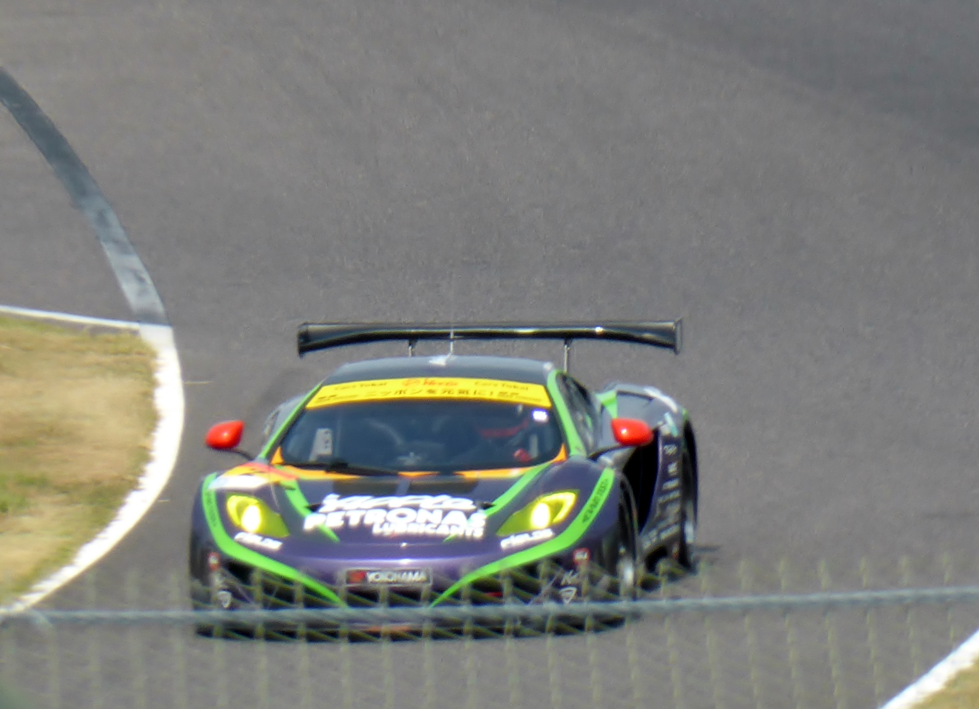 2013年度ポッカサッポロ1000㎞に於けるエヴァRT初号機アップルMP4-12Cを撮影。後日みんカラにもアップロード予定。